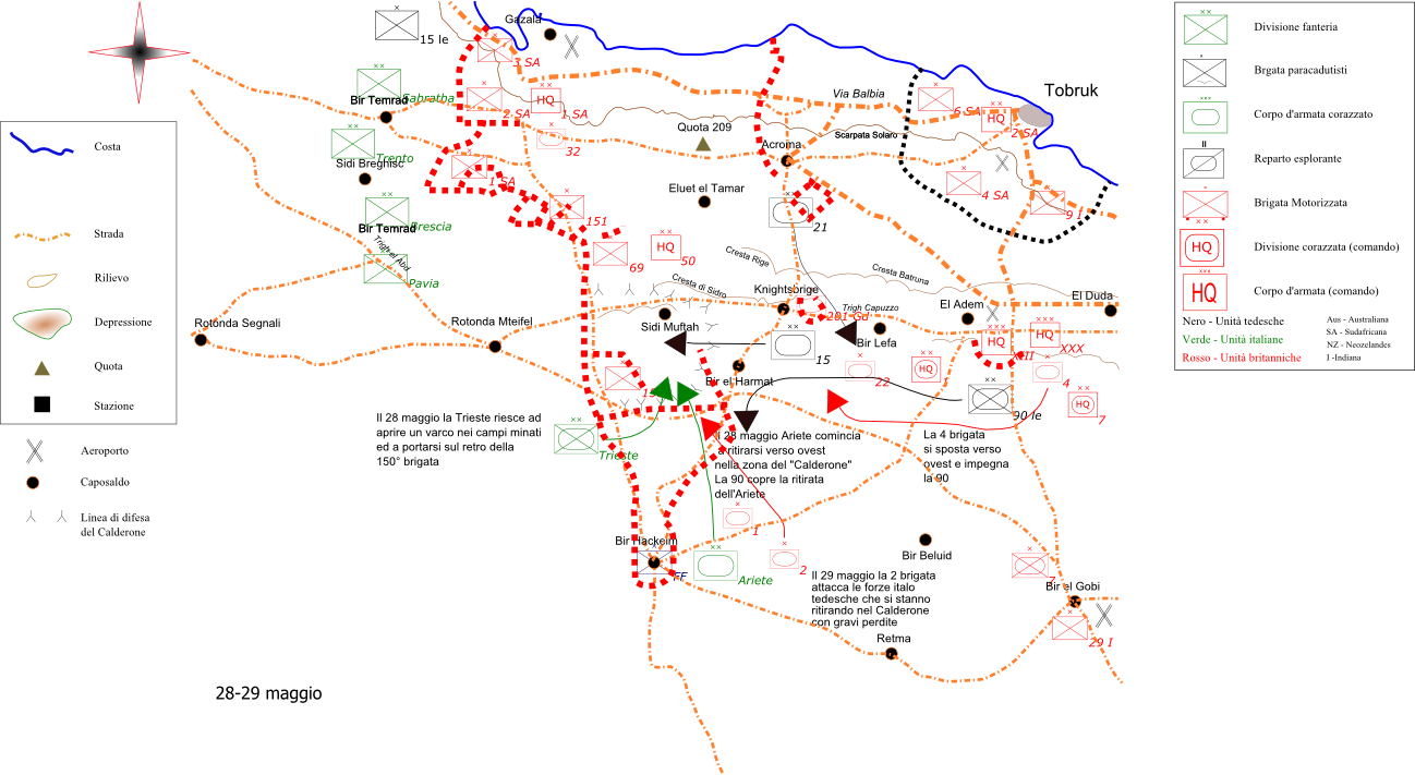 Eventi della battaglia di Ain el Gazala il 28 29 maggio 1942